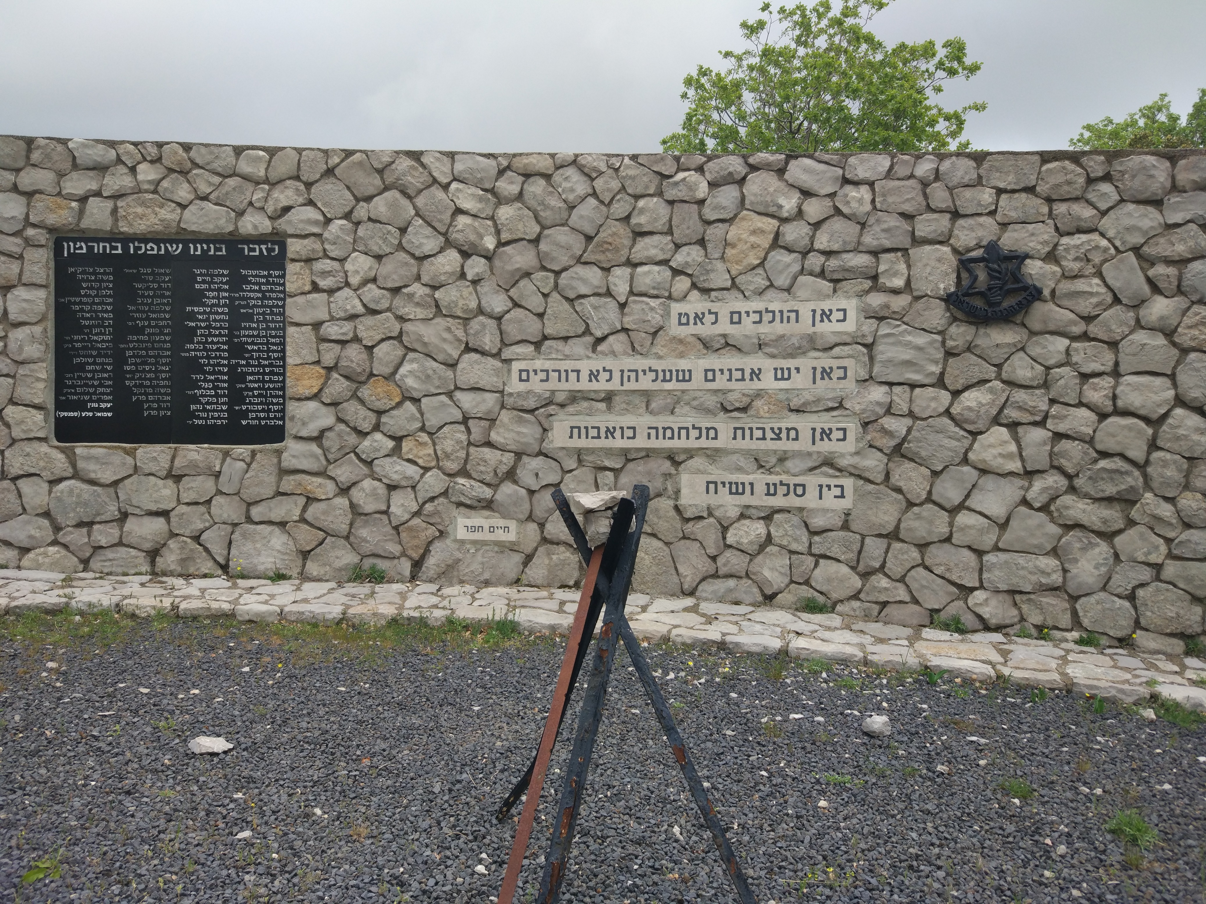 אנדרטה ללוחמי חטיבת גולני שנפלו בחרמון. על כביש 98, סמוך לחניון התחתון של אתר החרמון